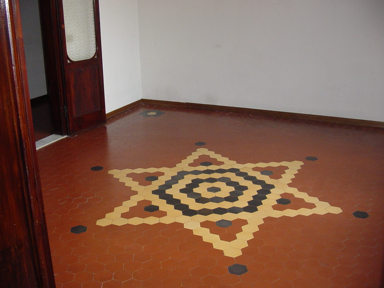 Pavimento a mosaico in Palazzo Bonanni, Carrara